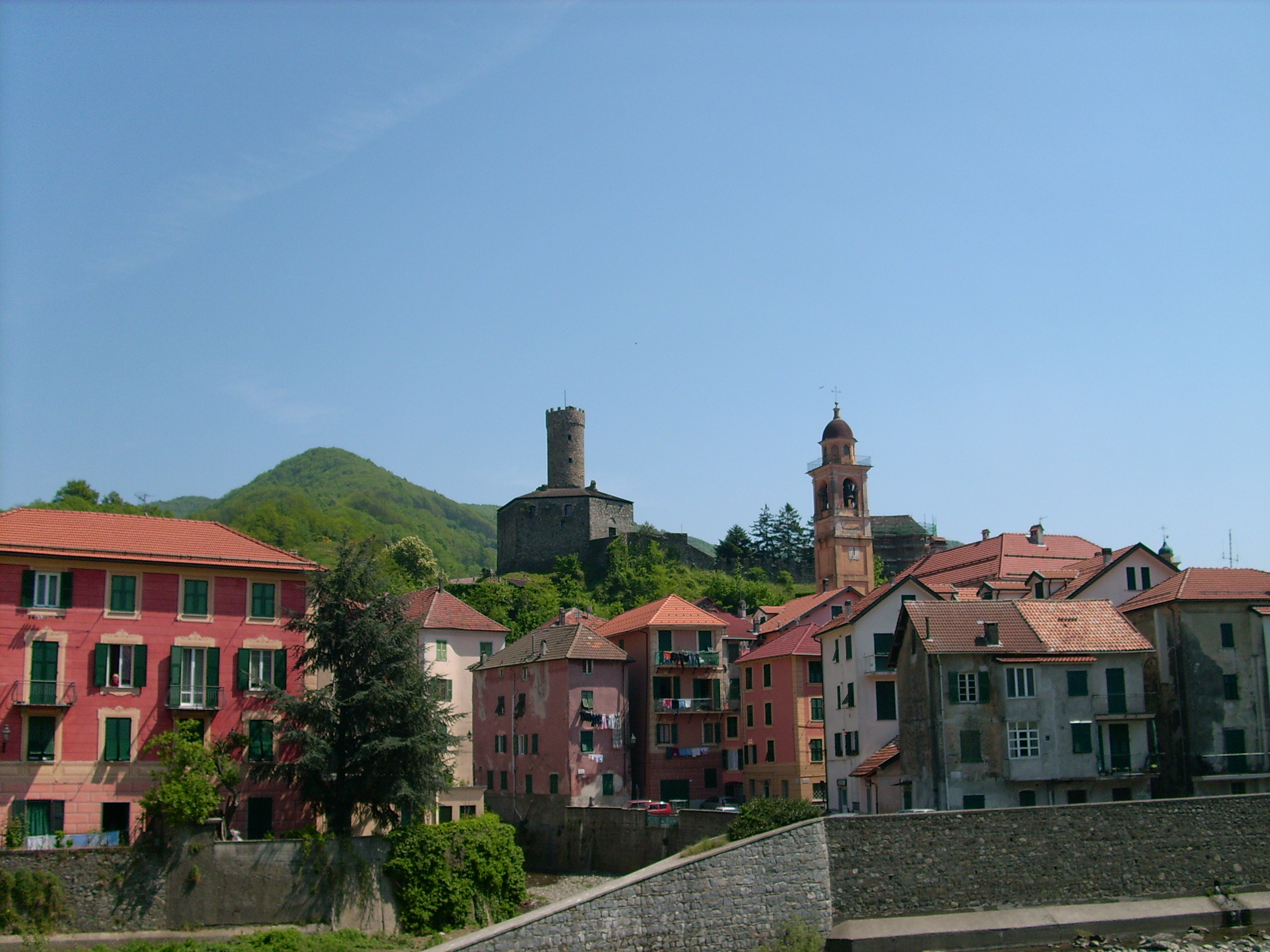 Campo Ligure, Liguria, Italia